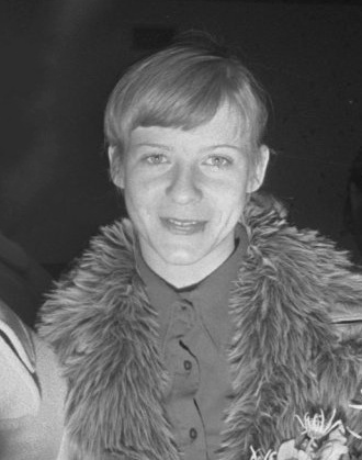 Tamara Lazakovich